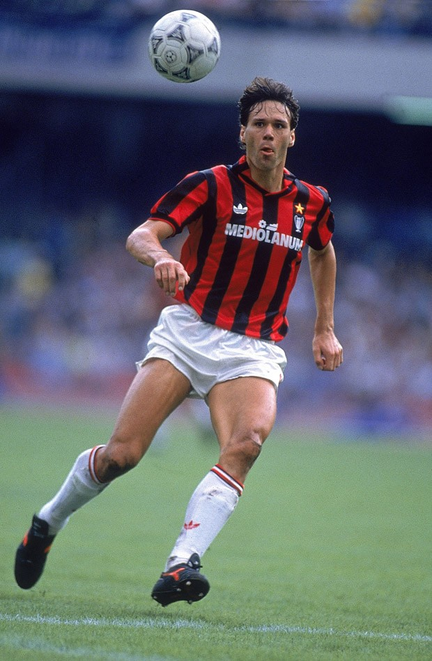 Il calciatore olandese Marco van Basten in azione con la maglia del Milan nei primi anni '90 del XX secolo. Licensing van Basten, Marco Categoria:Immagini di Marco van Basten